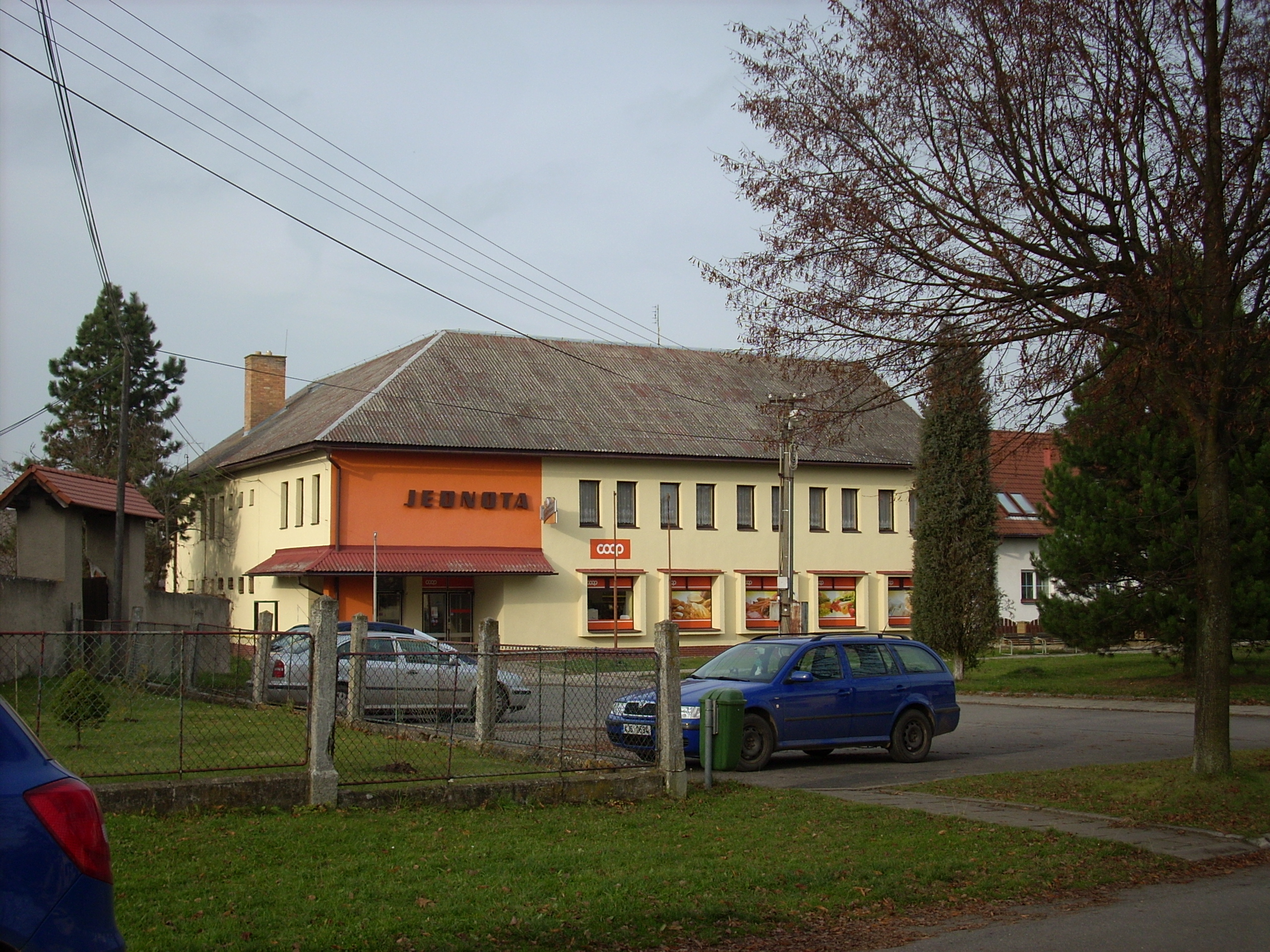 Nížkov, budova obchodu Jednota